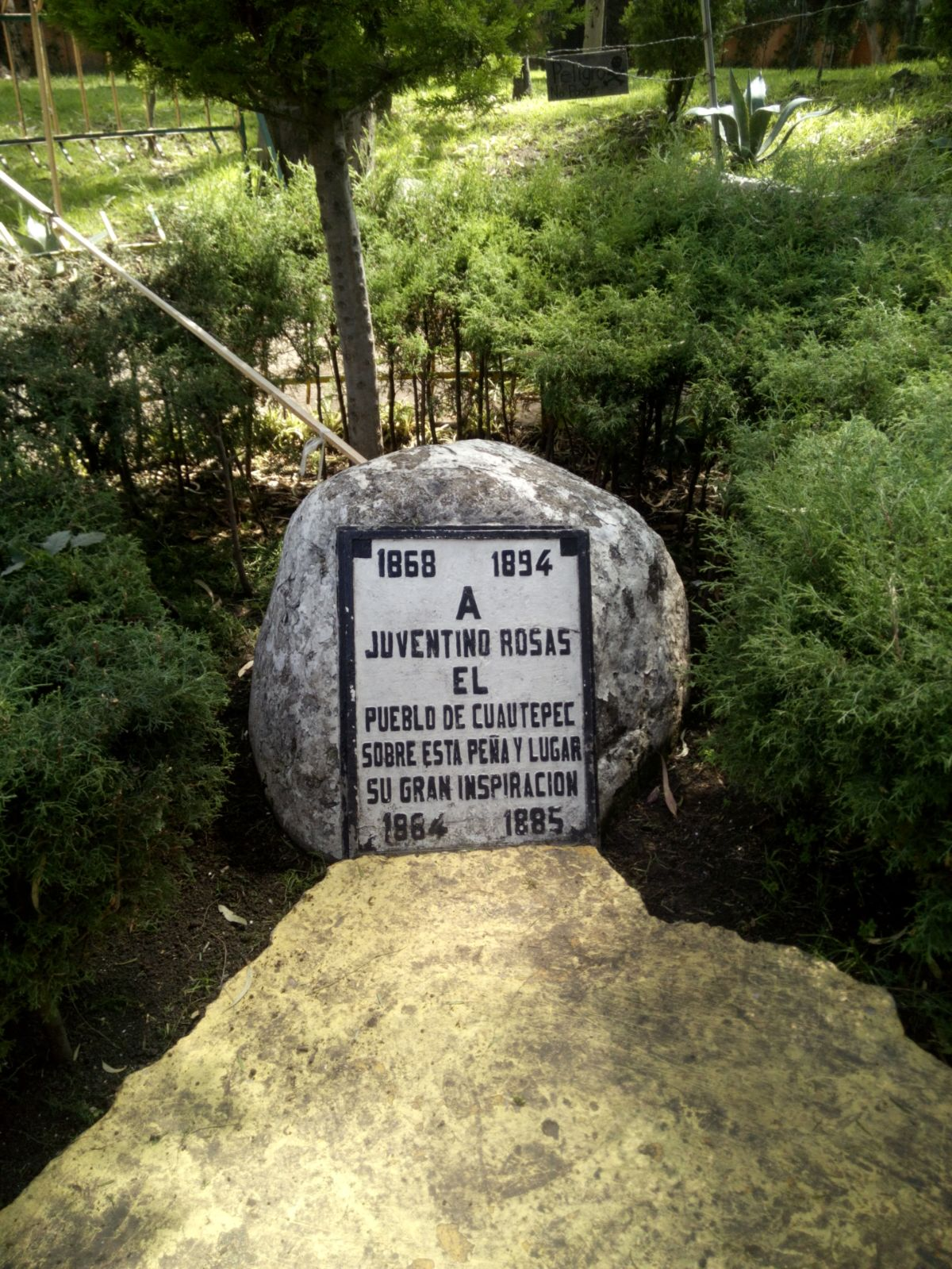 Peña donde escribió la obra que lo inmortalizo, Sobre las olas